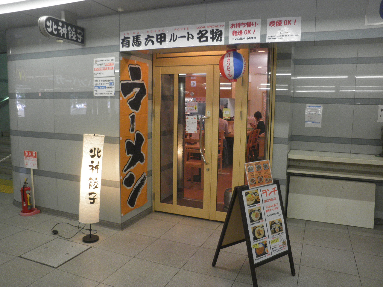 改札内にある北神餃子